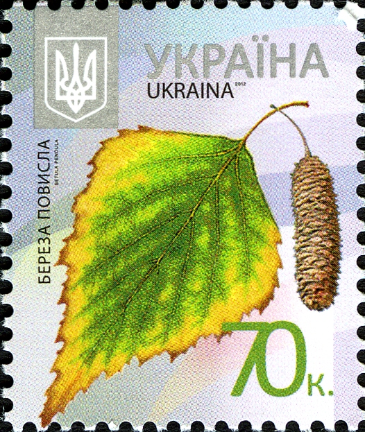 Восьмий випуск стандартних марок України. Береза повисла